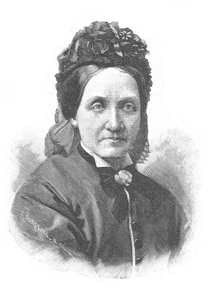 Pauline Åhman (1812-1904)